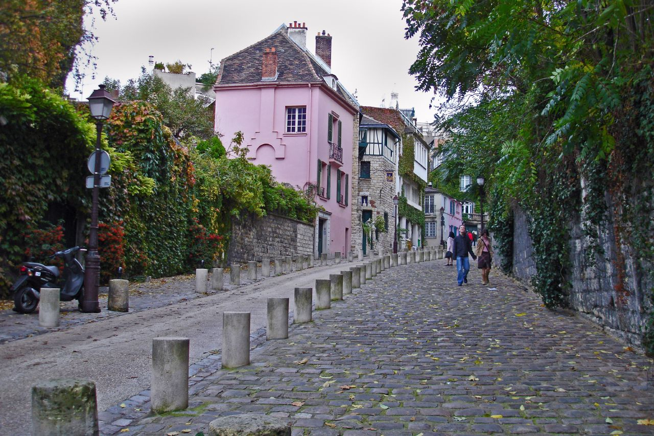 Montmartre streetMontmartre-1158